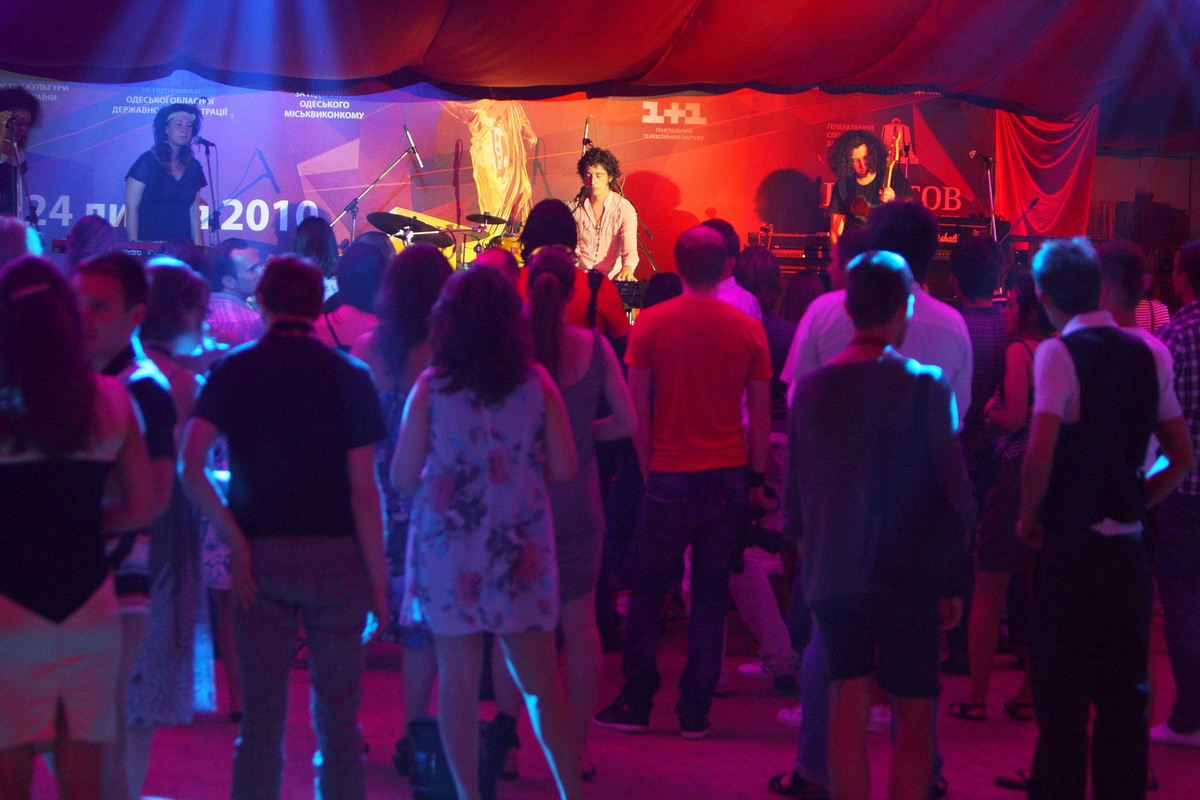 Фестивальные вечеринки: проект Дмитрия Шурова "Pianoboy" на Одесском кинофестивале